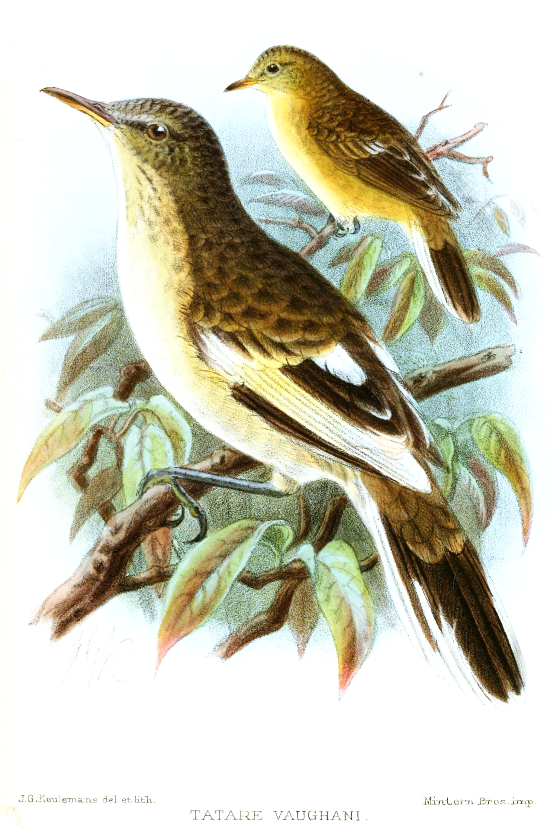 Tatare vaughani = Acrocephalus vaughani